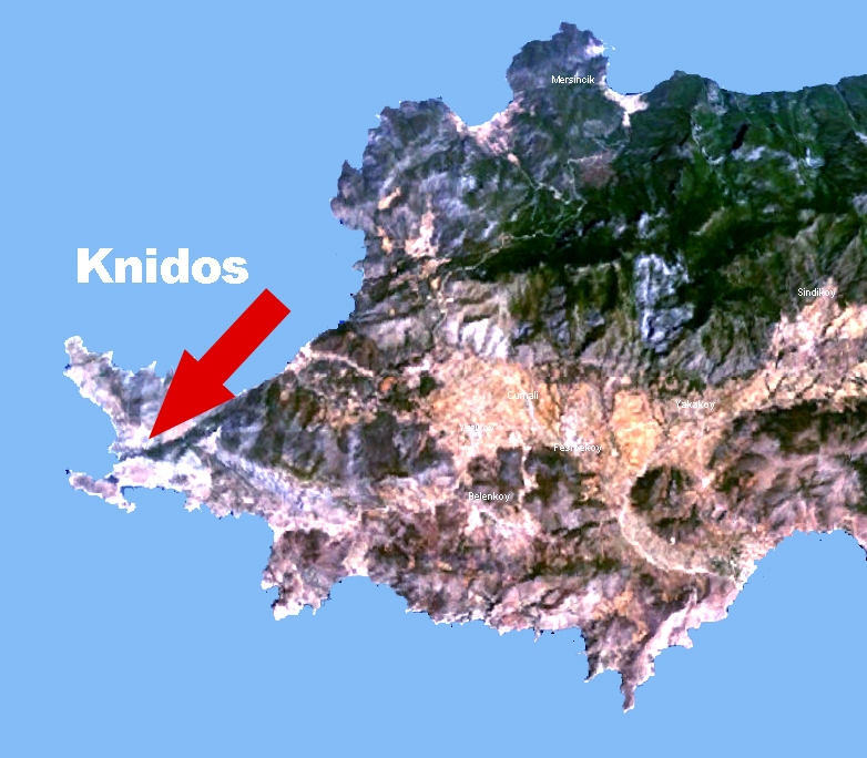 Posistion Knidos